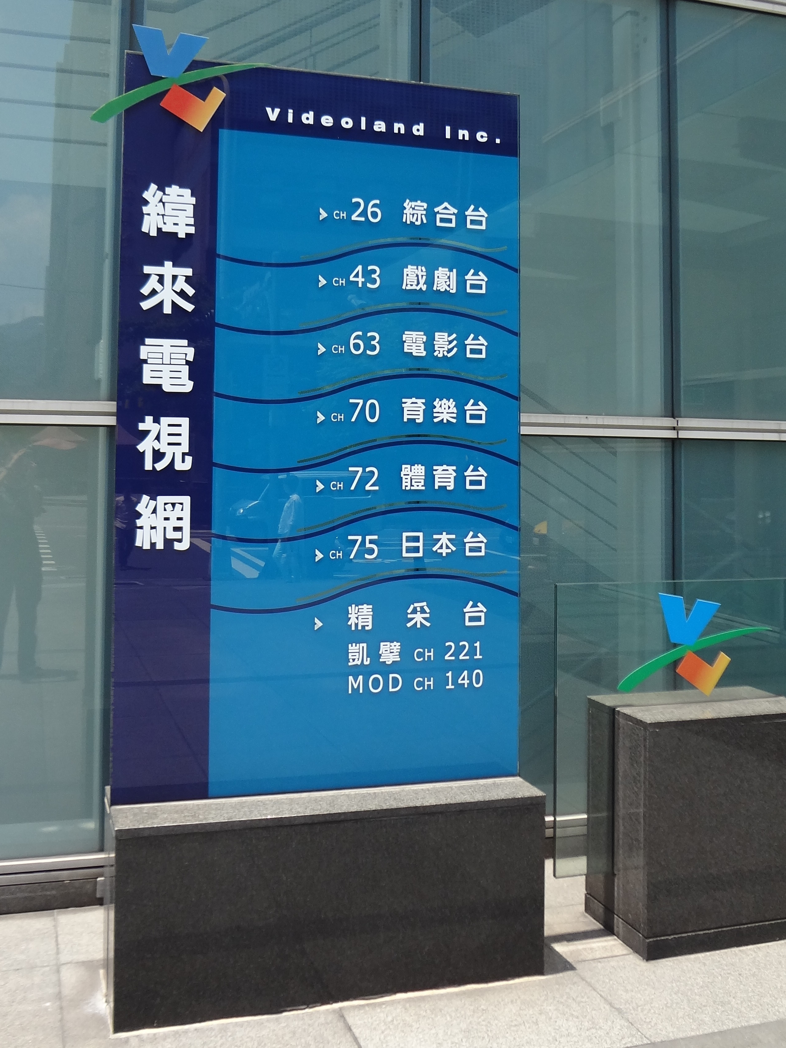 富邦人壽瑞光大樓左前方樹立的緯來電視網旗下頻道表。